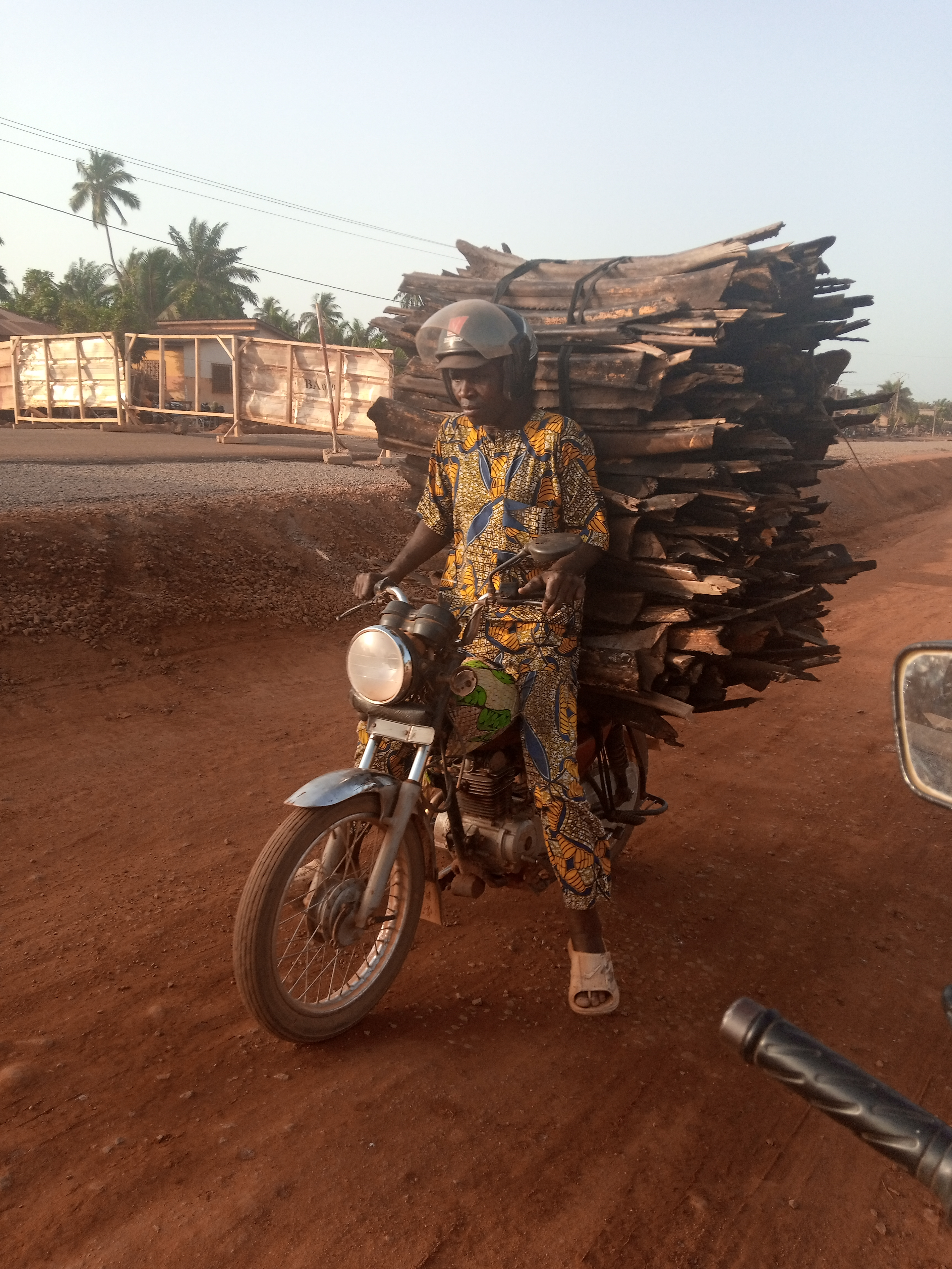 moto transportant du bois de chauffage This is an image with the theme "Africa on the Move or Transport" from: Benin